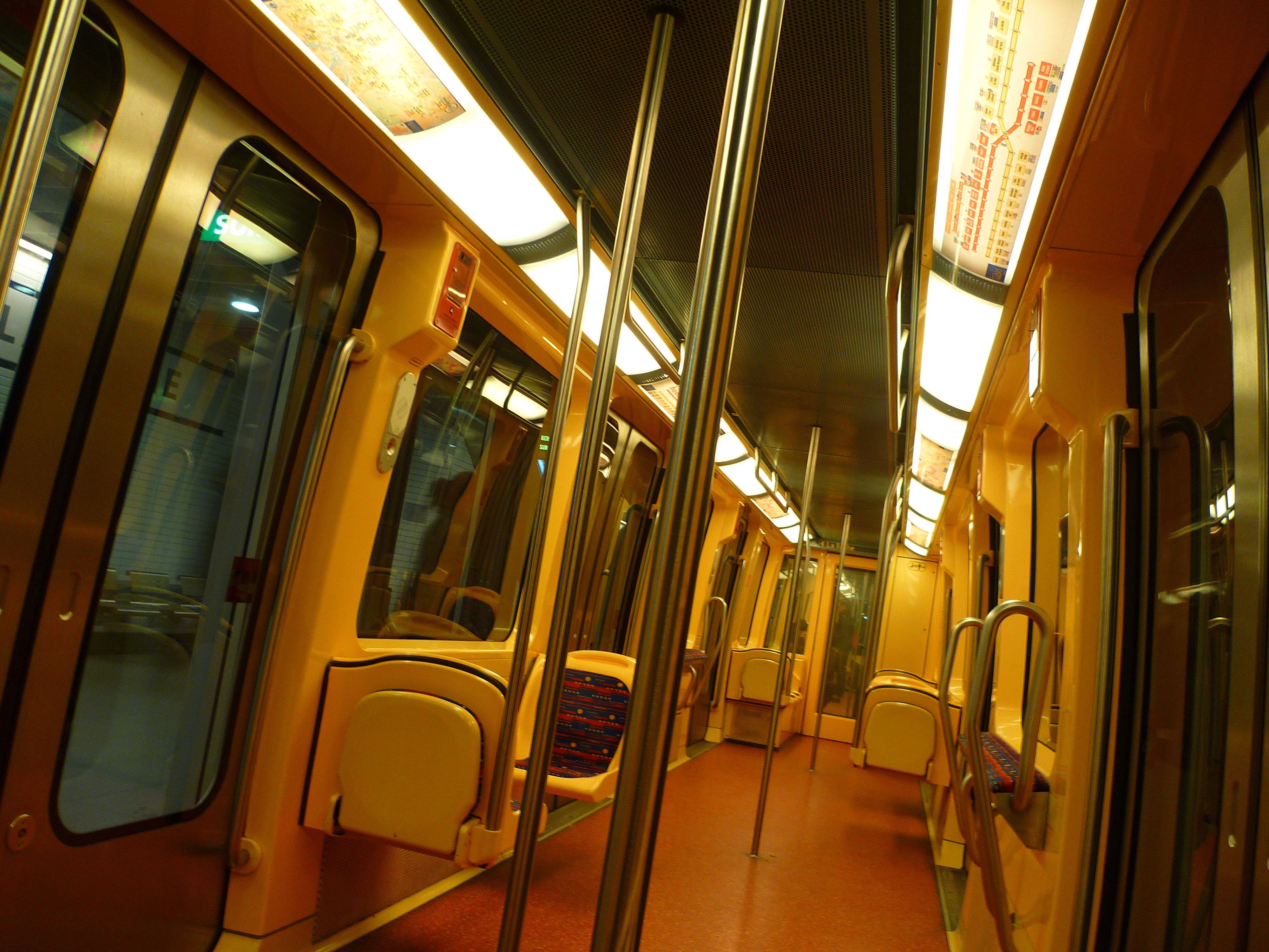 Dans une rame de la ligne B du métro toulousain.